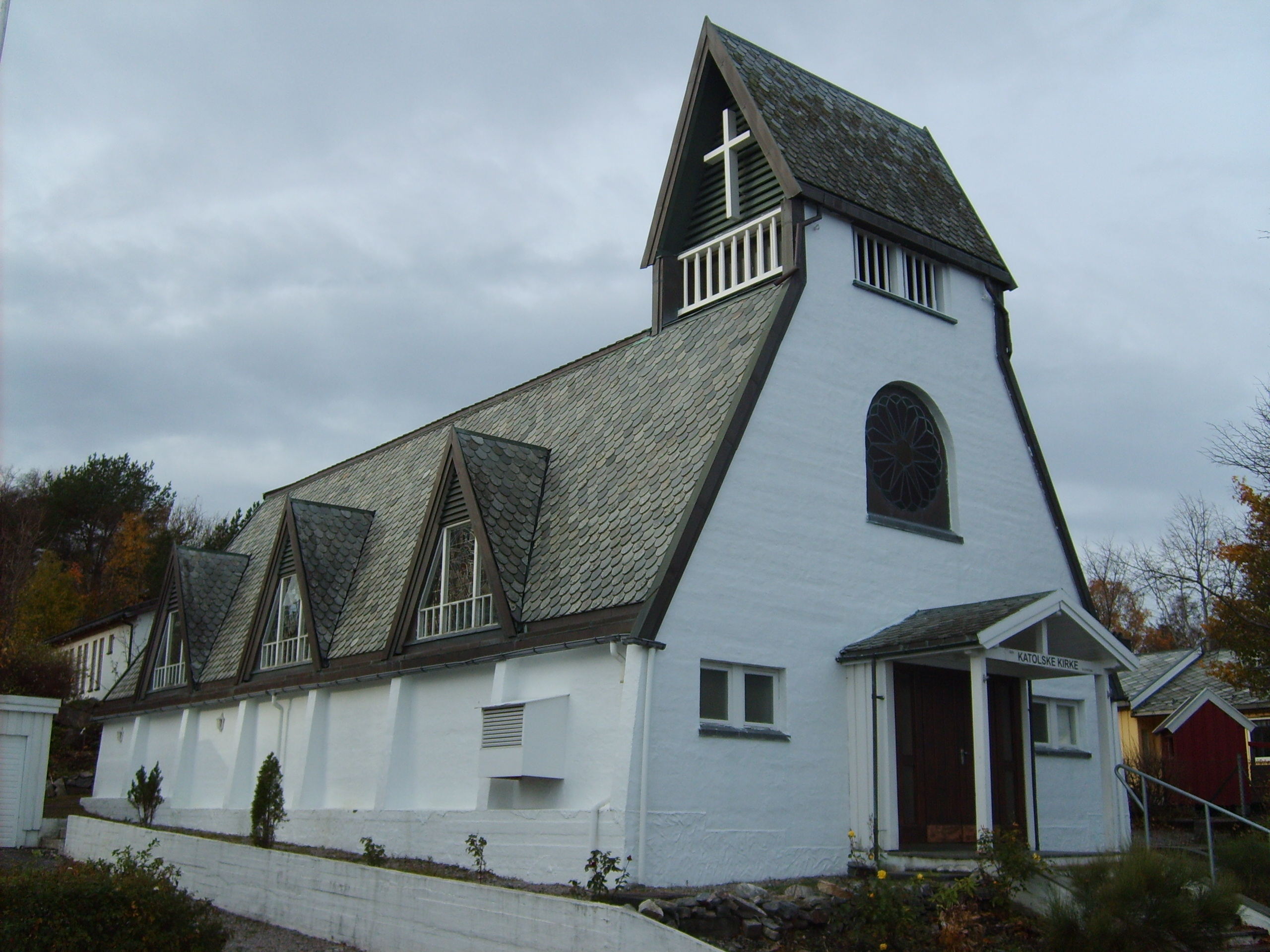 St. Eystein katolske kirke i Kristiansund. Foto: Olve Utne, fra Lokalhistoriewiki.